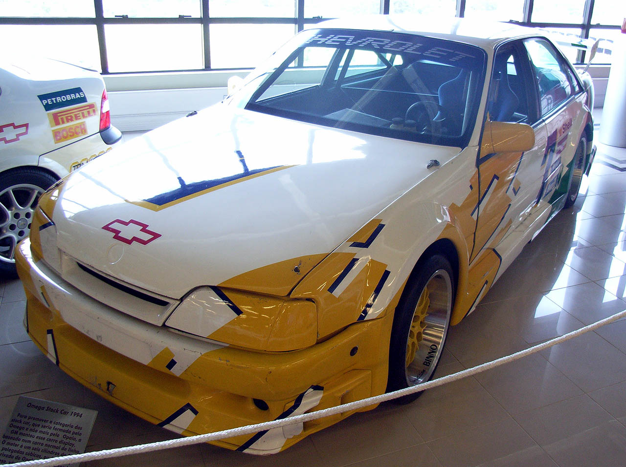 Stock Car Brasil: Chevrolet Omega in 1994.Owner: Museu da Tecnologia da Ulbra